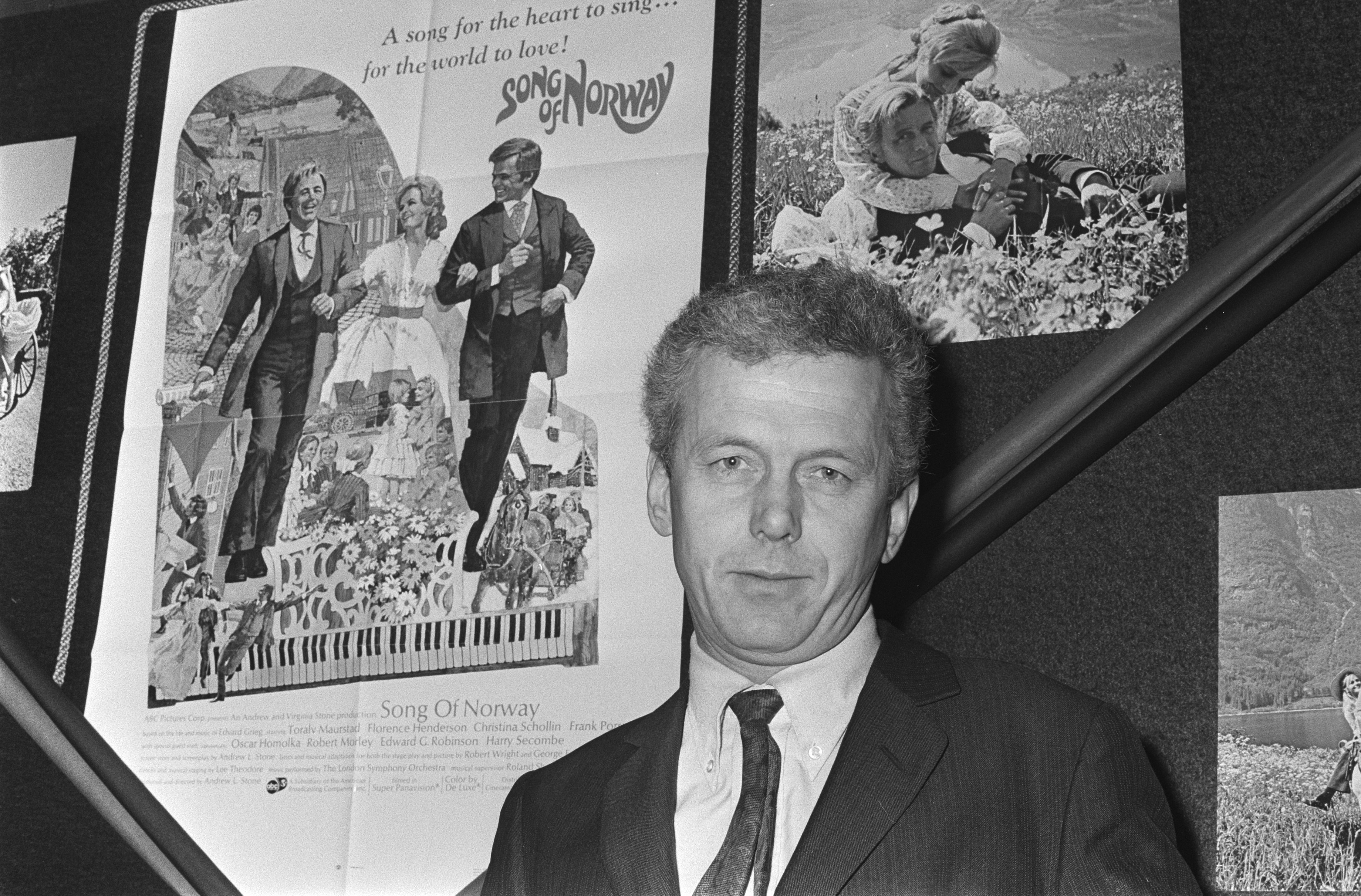 Collectie / Archief : Fotocollectie Anefo Reportage / Serie : Première van de musicalfilm "Song of Norway" in Cinerama te Amsterdam Beschrijving : Noorse acteur Toralv Maurstad, die de rol van Edvard Grieg speelt, voor het filmaffiche Datum : 11 maart 1971 Locatie : Amsterdam, Noord-Holland Trefwoorden : acteurs, affiches, bioscopen, films, filmsterren, portretten Persoonsnaam : Maurstad, Toralv Fotograaf : Fotograaf Onbekend / Anefo Auteursrechthebbende : Nationaal Archief Materiaalsoort : Negatief (zwart/wit) Nummer archiefinventaris : bekijk toegang 2.24.01.05 Bestanddeelnummer : 924-3493